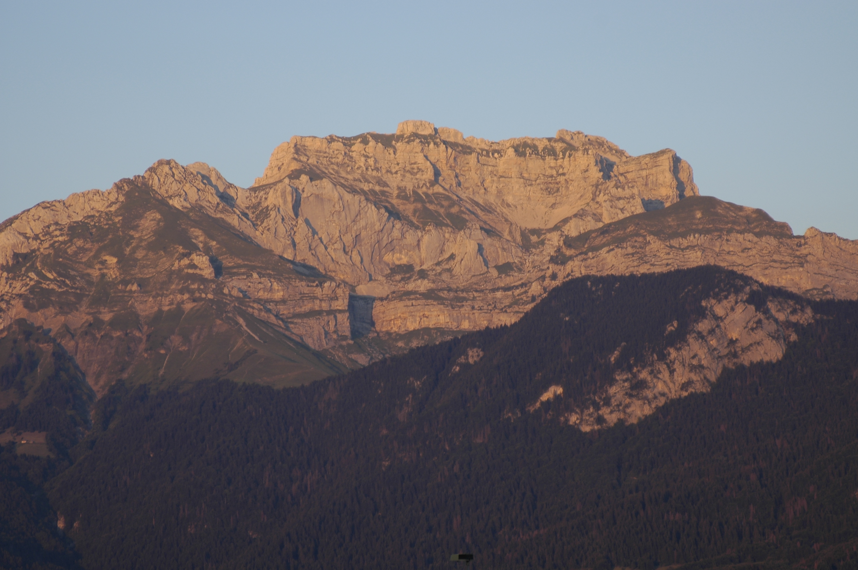 Le sommet de la Tournette vu depuis la rive gauche du lac, au crépuscule.